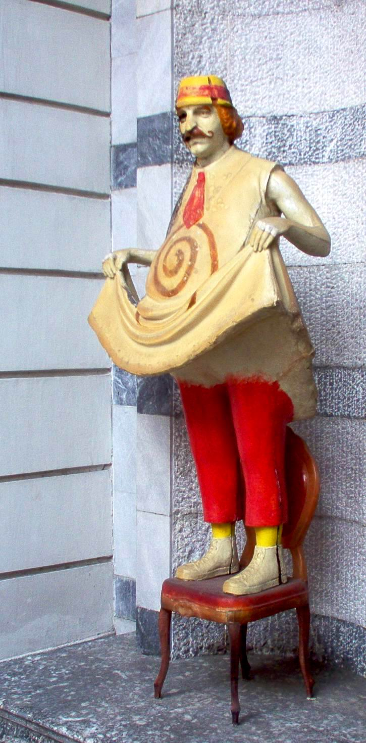 Statue of Zoran Radmilović, Belgrade, Serbia/Statue de Zoran Radmilović devant l'Atelje 212, Belgrade, Serbie